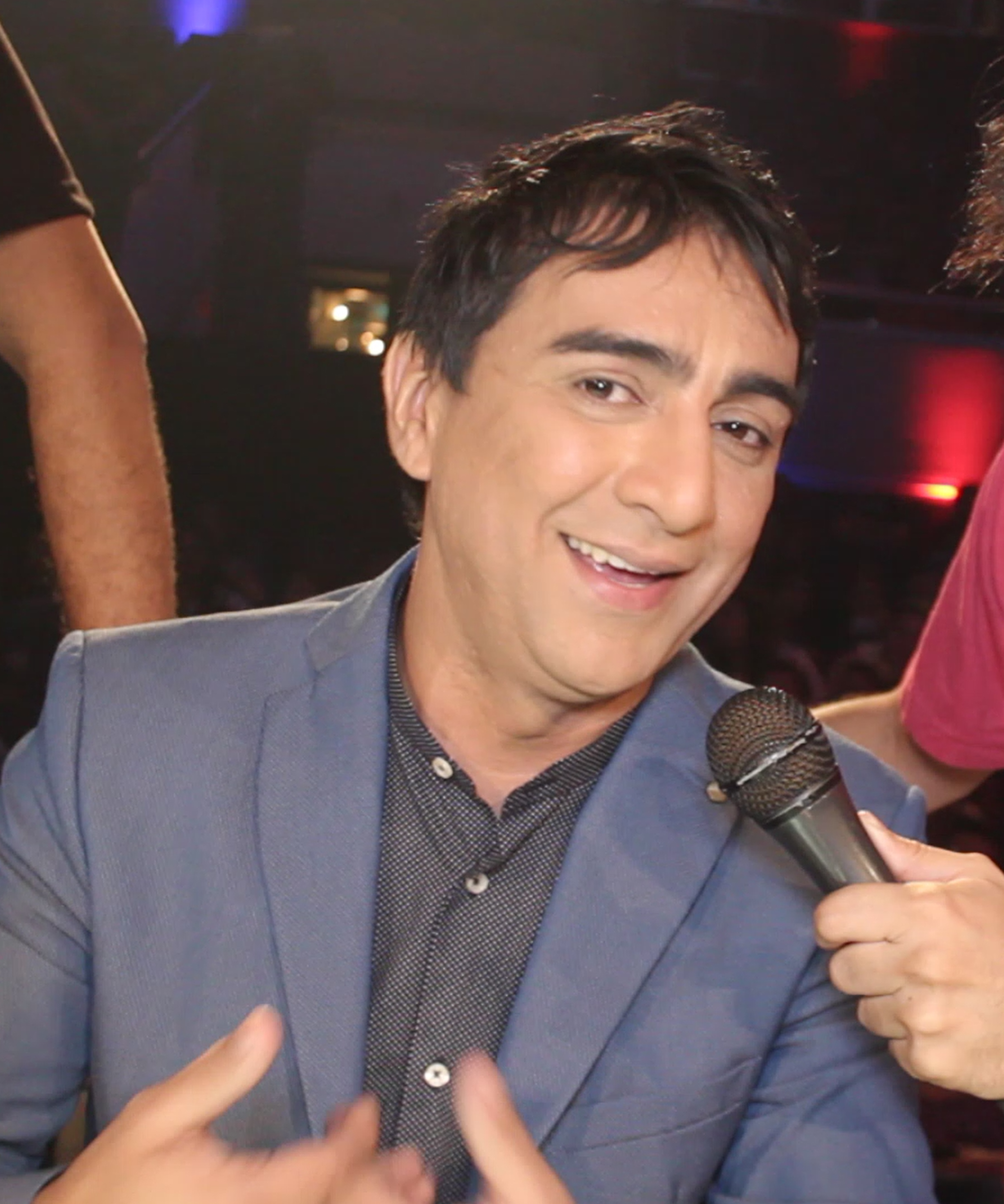 Fernando Villarroel como jurado de Ecuador Tiene Talento en 2015.